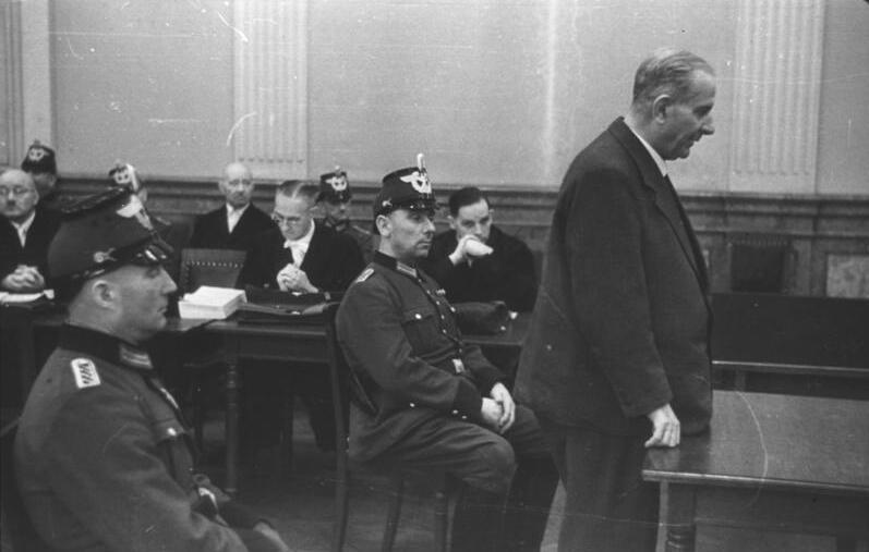 Volksgerichtshof, Carl Wentzel Berlin.- Volksgerichtshof, Prozess nach dem 20. Juli 1944; Carl Wentzel Abgebildete Personen: Wentzel, Carl: Prozeß 20. Juli 1944, Deutschland